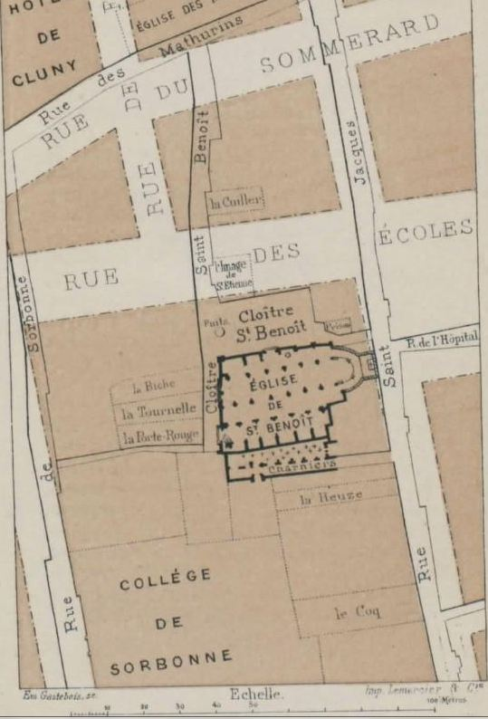 Plan des environs du Cloître de Saint-Benoît-le-Bétourné à Paris au temps vide François Villon.